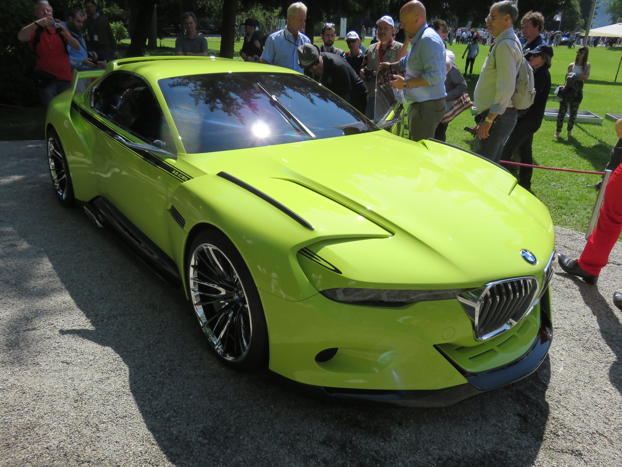 BMW 3.0 CSL Hommage, concours élégance Villa Este 2015